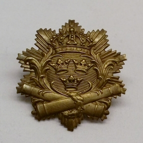 Emblem till hatt m/1903 för manskap Positionsartilleriregementet (A 9).